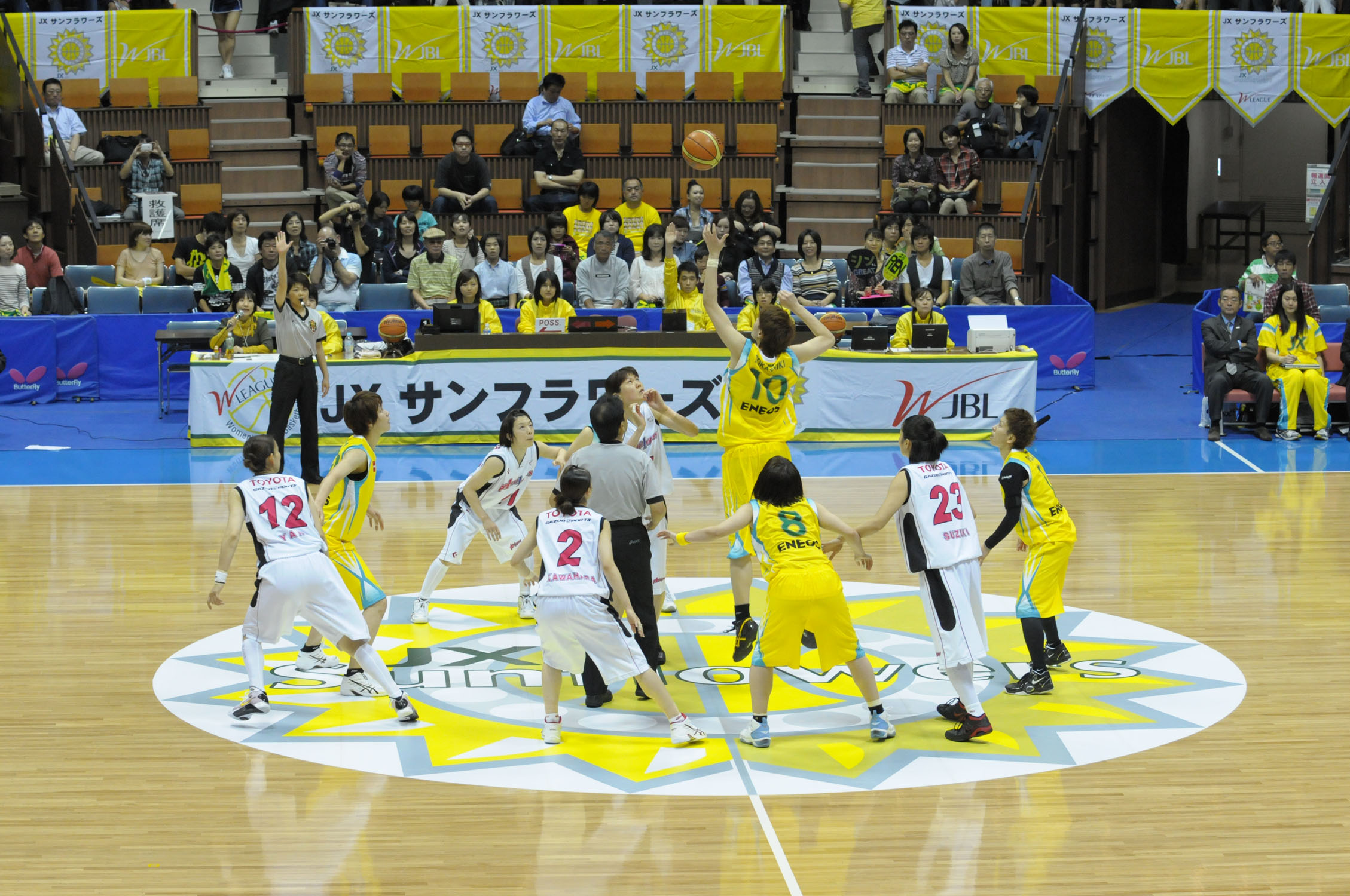 WJBL 11-12レギュラーリーグ、トヨタ対JX。代々木第二体育館。